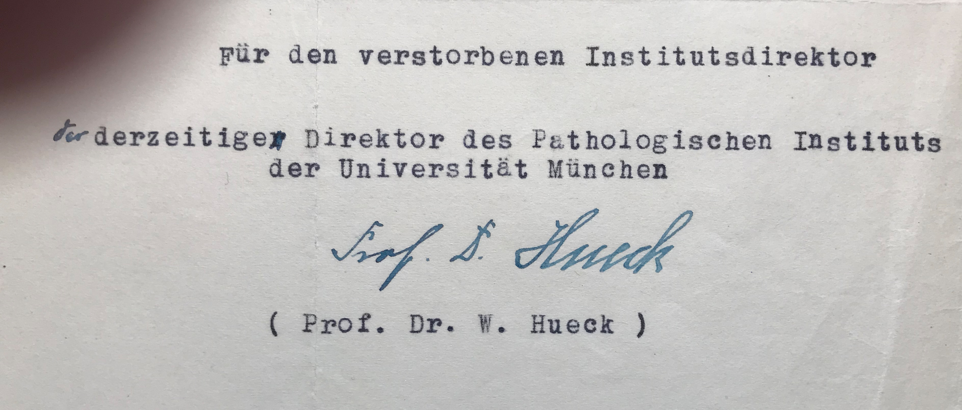 Unterschrift von Werner Hueck auf einem Dokument. Abfotografiert vom Original.